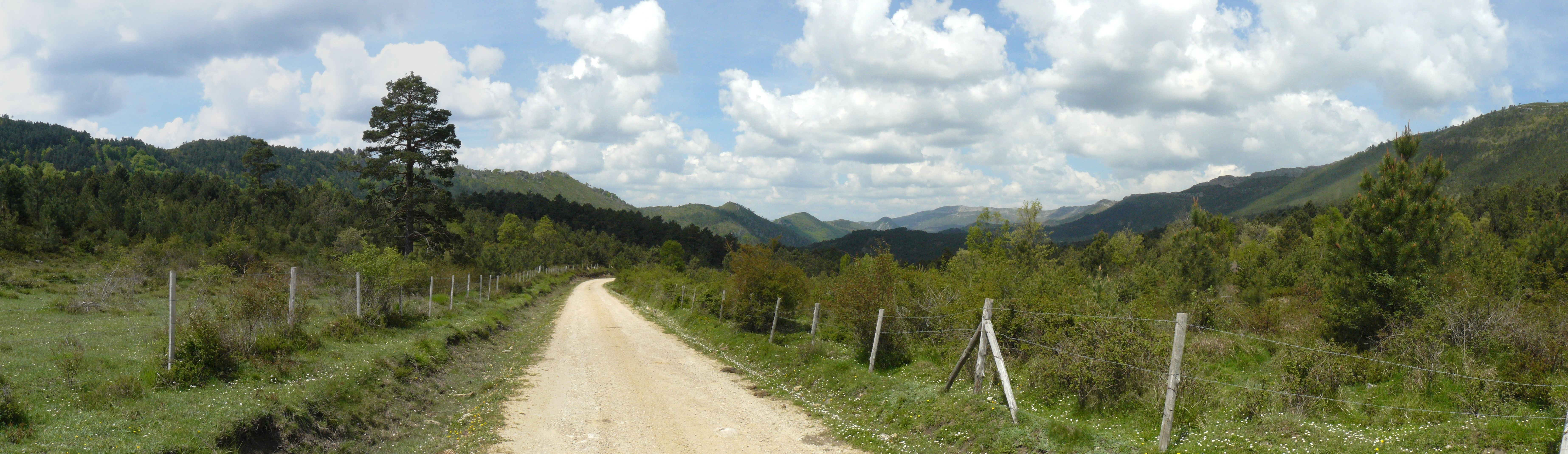 Picos de la Sierra de La Tesla, Burgos, entre Tartalés de Cilla Y Tartalés de los Montes, hacia poniente.